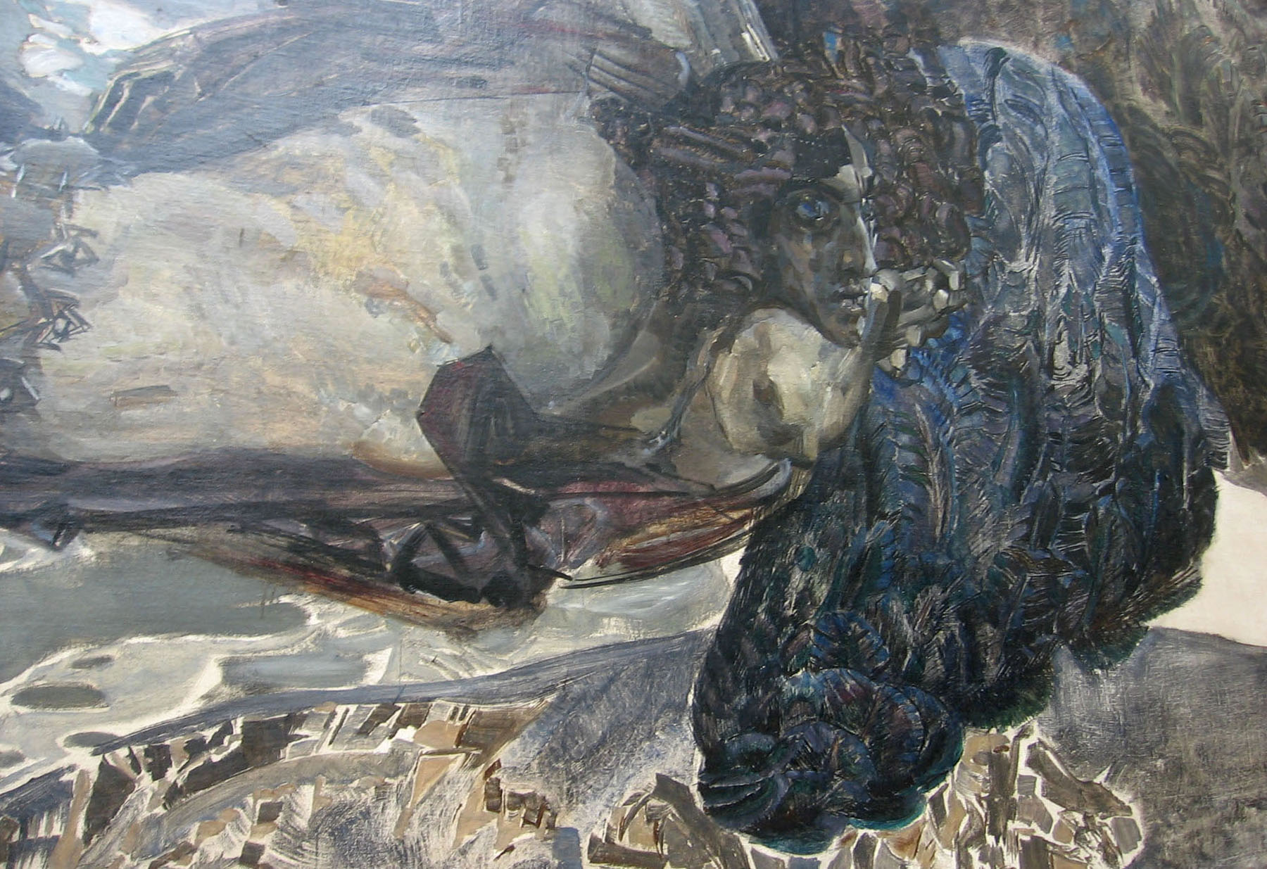 Фрагмент картины "Демон летящий" Михаила Врубеля